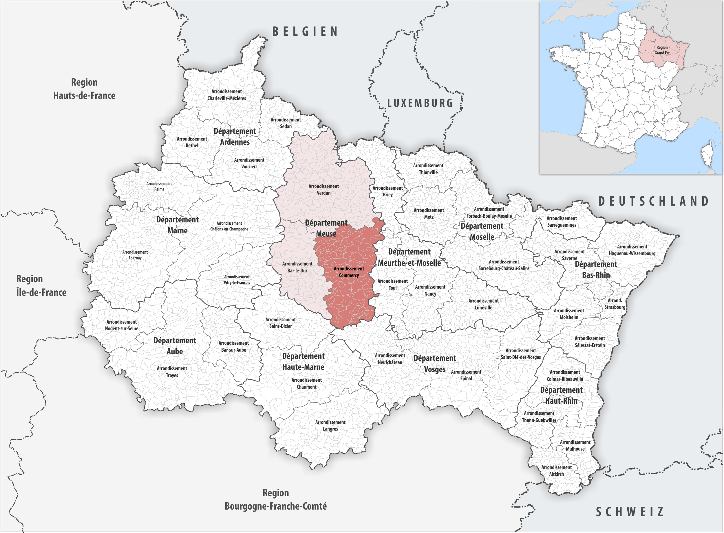 Lage des Arrondissements Commercy